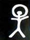 réplica baseada no relato dos moradores de como seria a Pedra do Santinho. Desenho do escultor Maurício Munhoz, 1998.